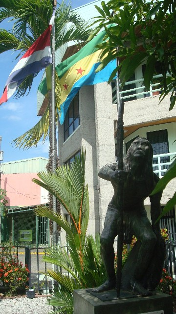 Estatua del rey Garabito frente a la Municipalidad del cantón de Garabito, Puntarenas, Costa Rica.